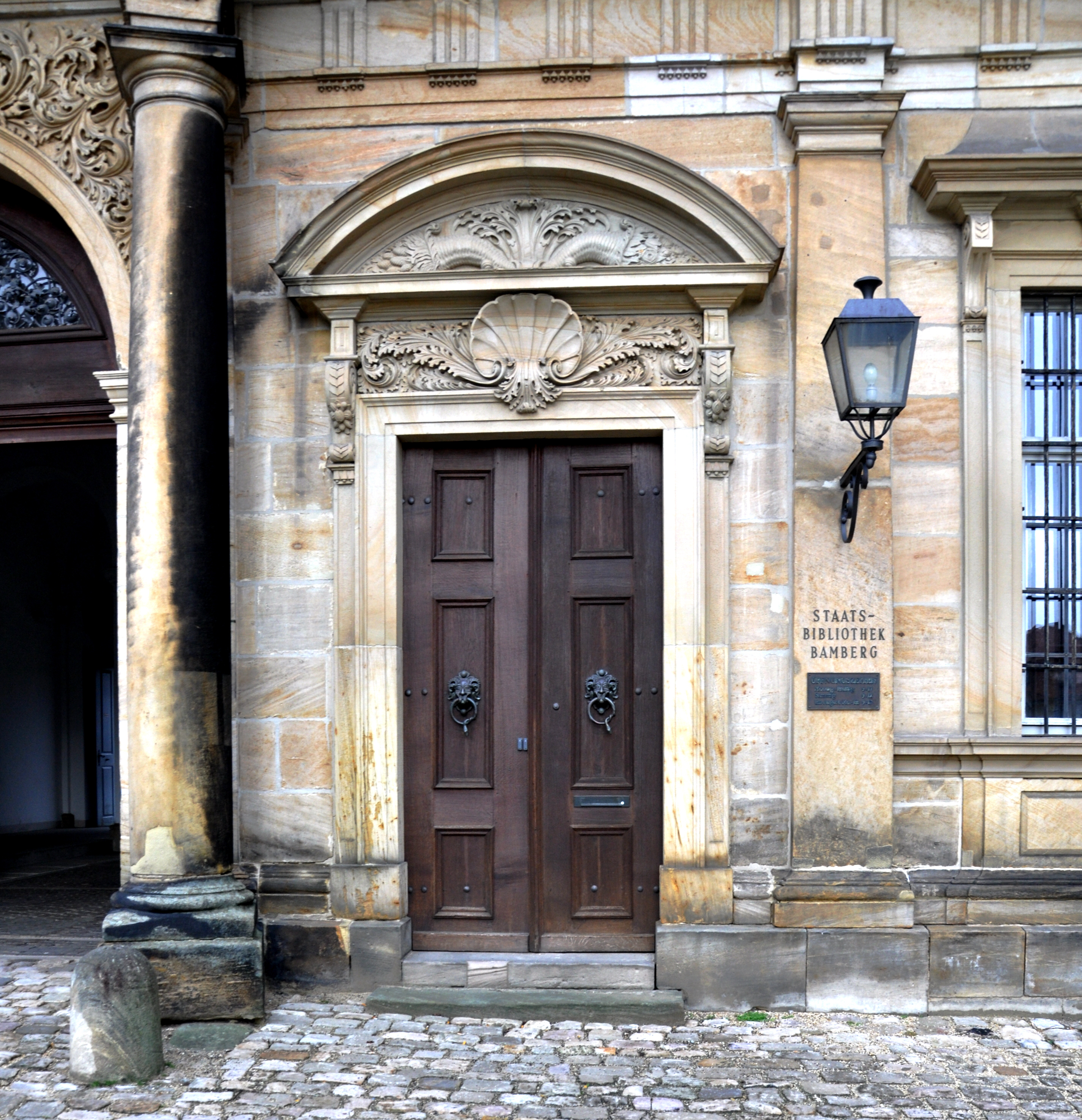 Bamberg, Neue Residenz, Eingang zur Staatsbibliothek